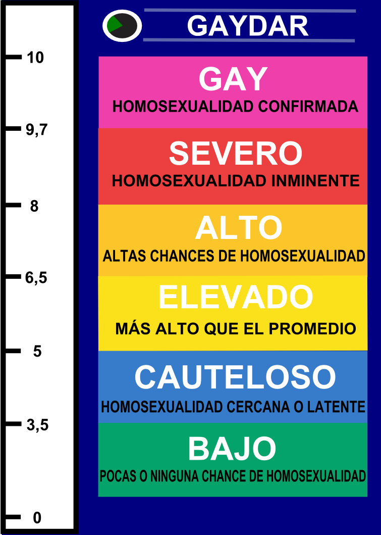 Ilustración que representa a un gaydar (radar gay) realizado con Inskape.